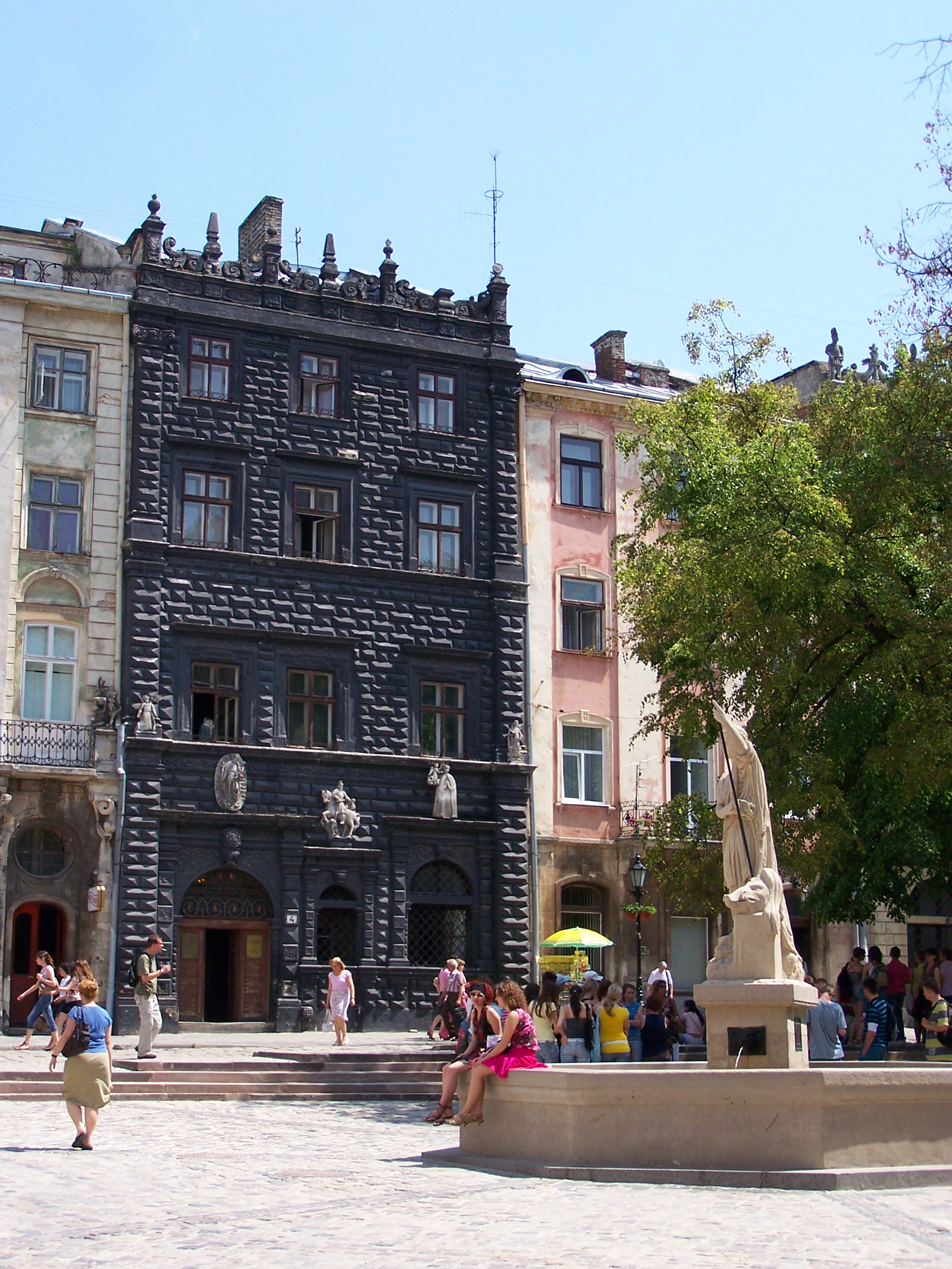 Czarna kamienica przy rynku we Lwowie (Ukraina).